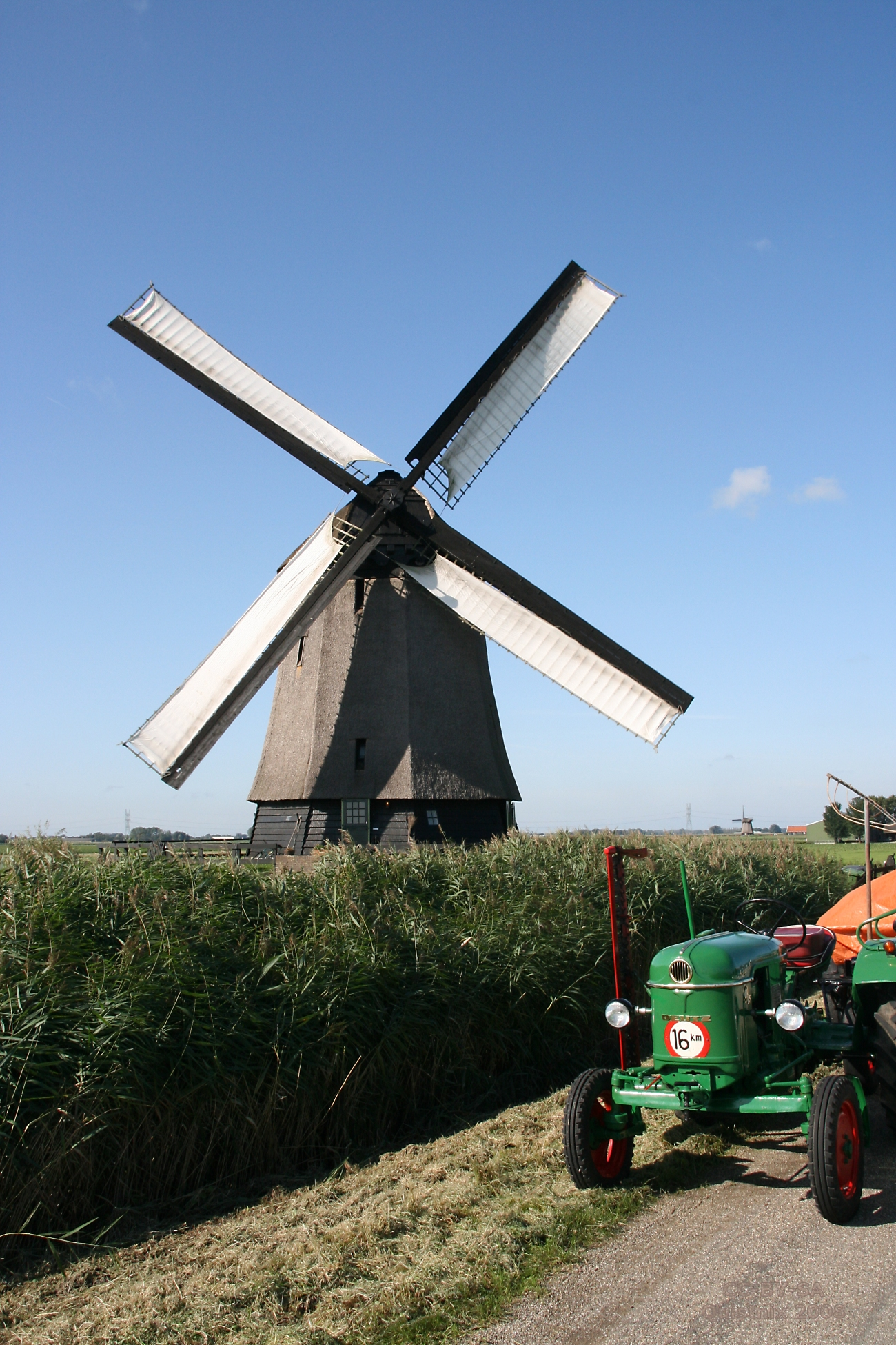 Schermerhorn: Ondermolen C met zeilen, met op de voorgrond een klassieke Deutz D 15 trekker.